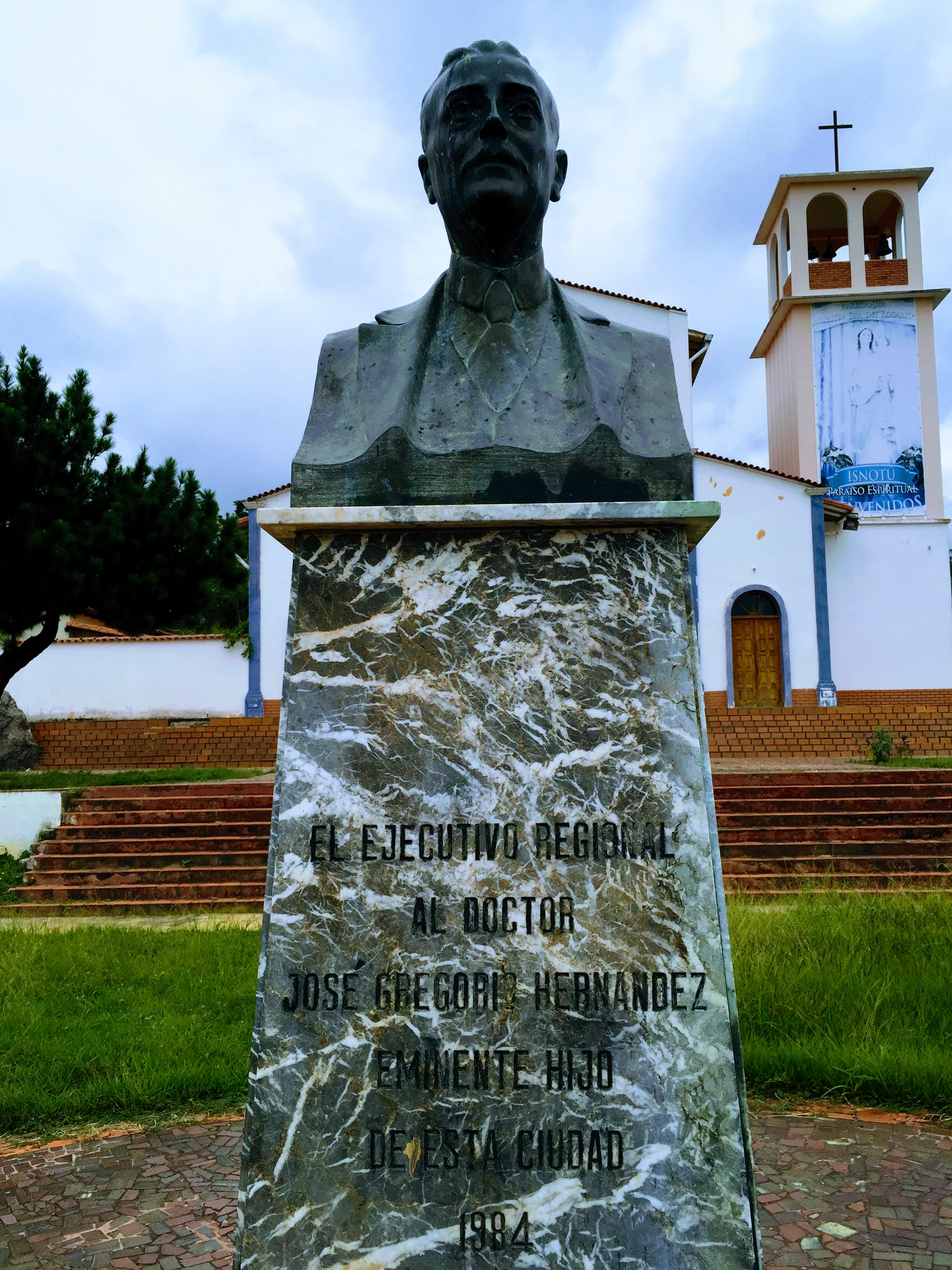 Busto de José Gregorio Hernández en su natal Isnotú